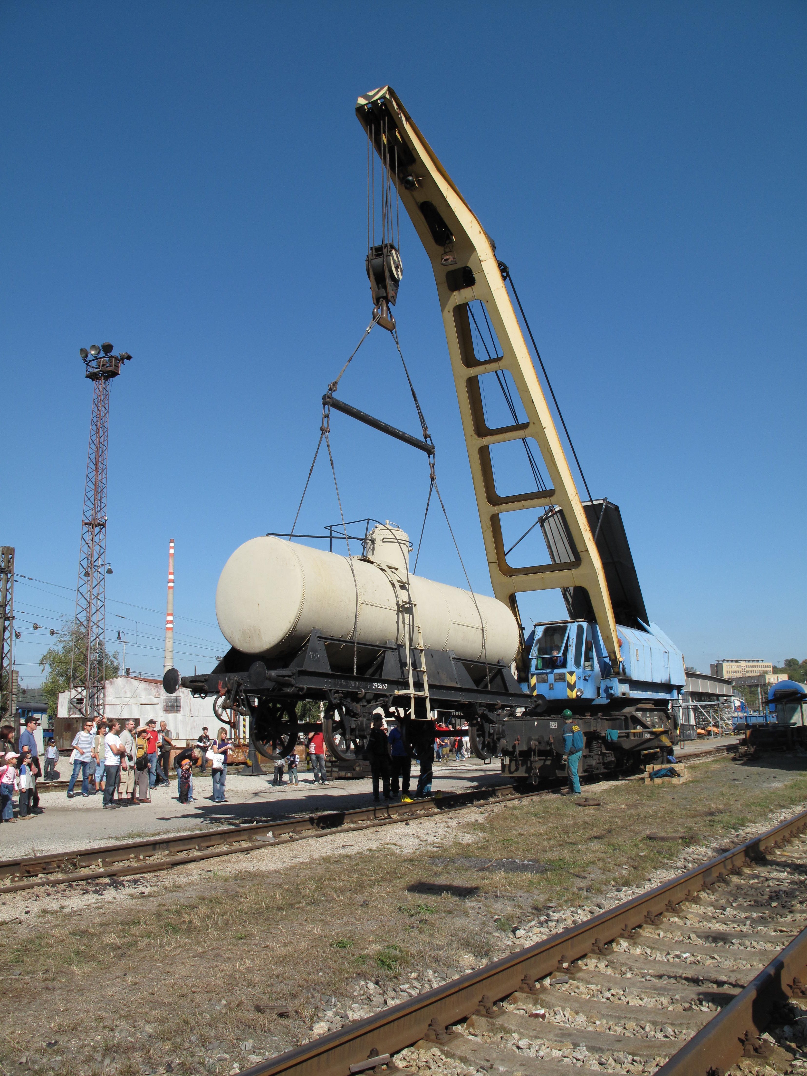 Den otevřených dveří v depu v Maloměřicích